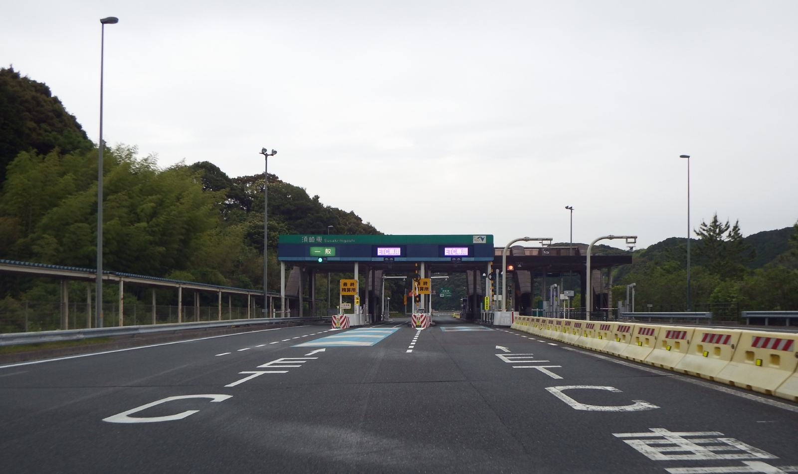 須崎東インターチェンジ